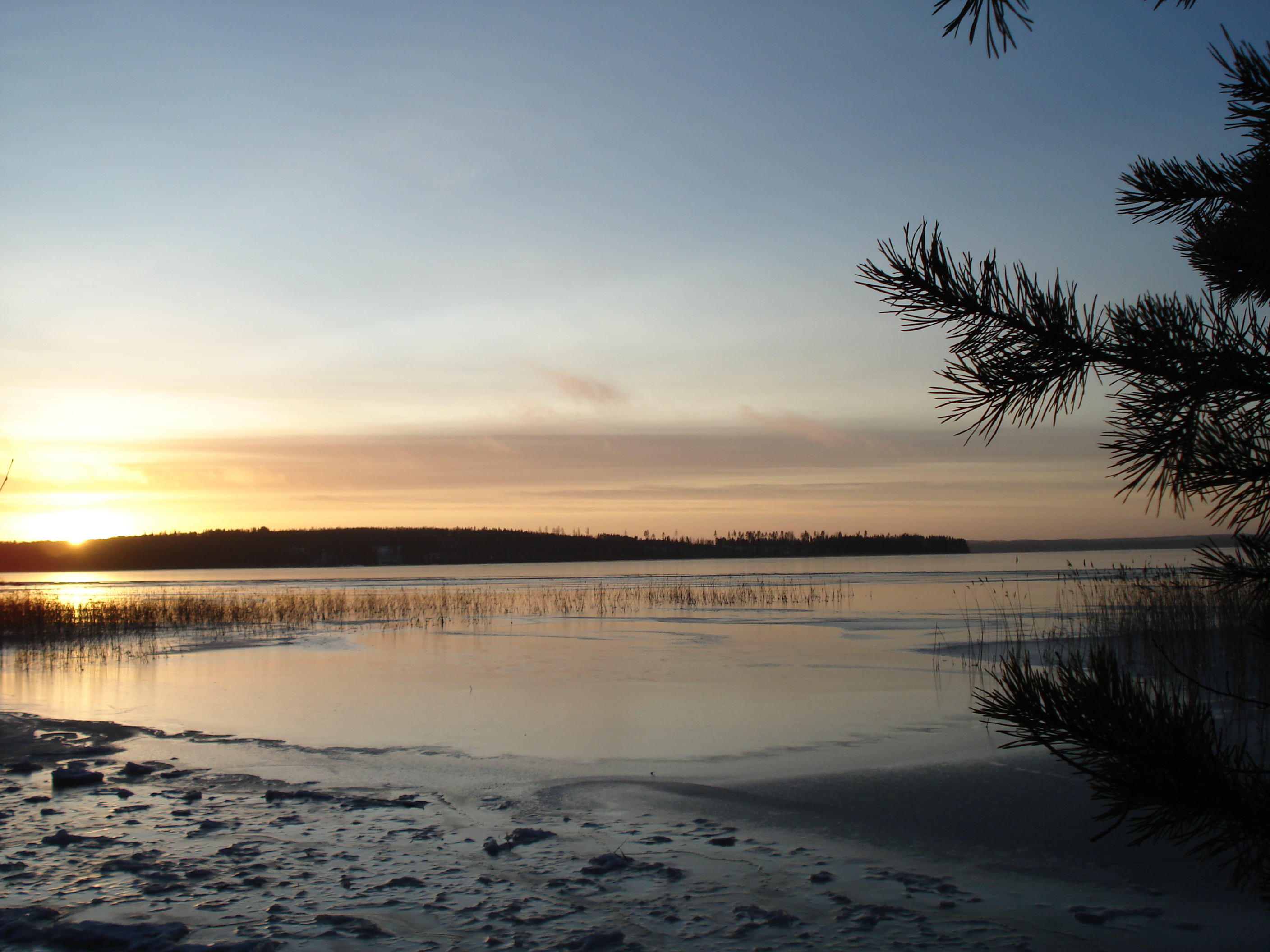 Vuohijärven Kinansaari nähtynä Kauppilanrannasta